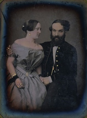 Alphonse Plumier(1819–1877) Modeste Moussorgsky et une amie (vers 1857-1858)